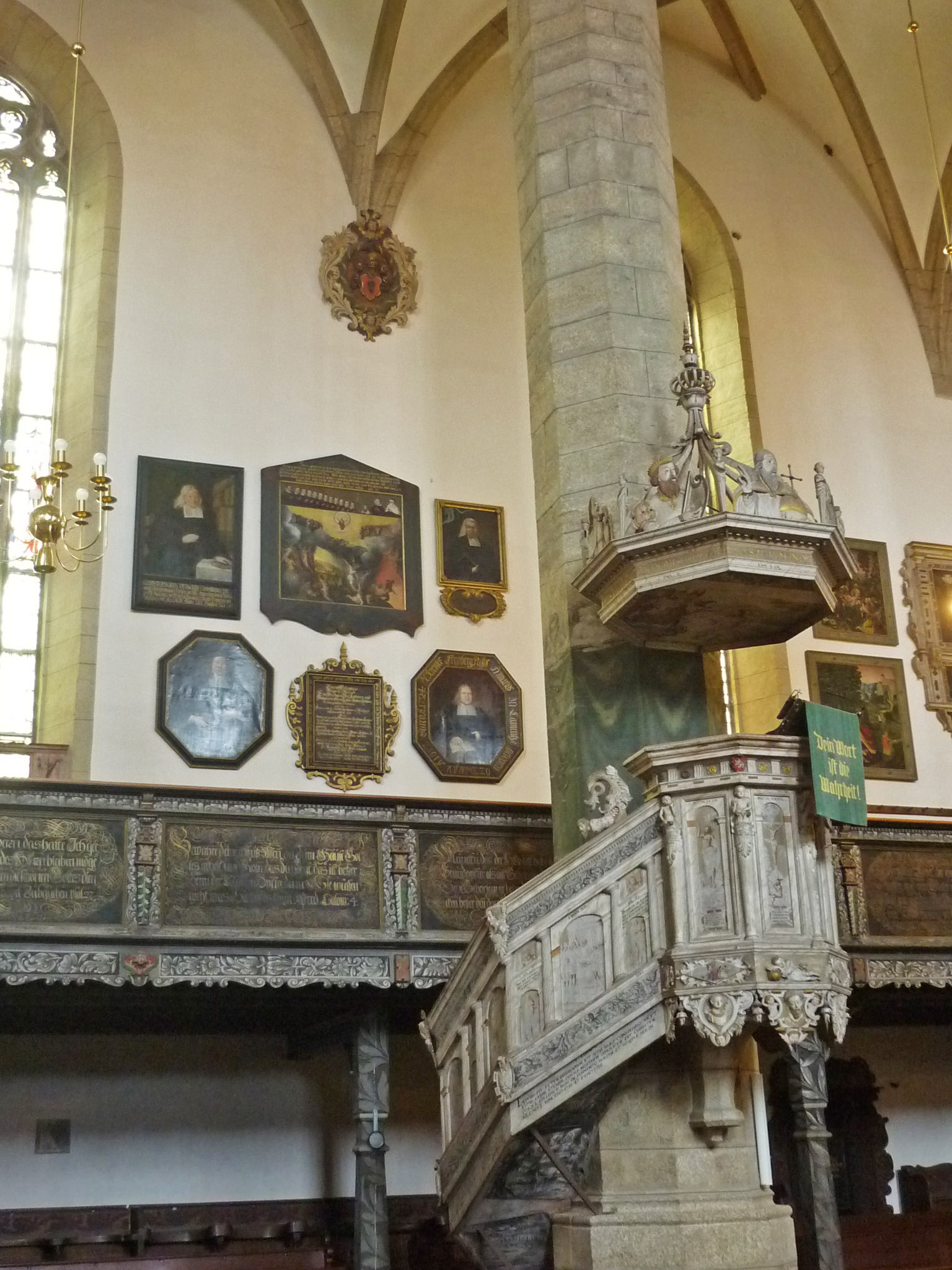 Kamenz, Marienkirche, Kanzel